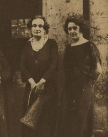 Photo de Paul Grappe et sa femme, connu dans les faits divers comme déserteur et travesti, héros du roman La Garçonne et l'assassin, de la bande-dessinée Mauvais genre et du film d'André Téchiné Nos années folles.